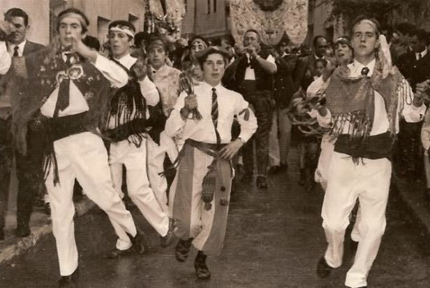 Danzadores beliforanos a principios del siglo XX